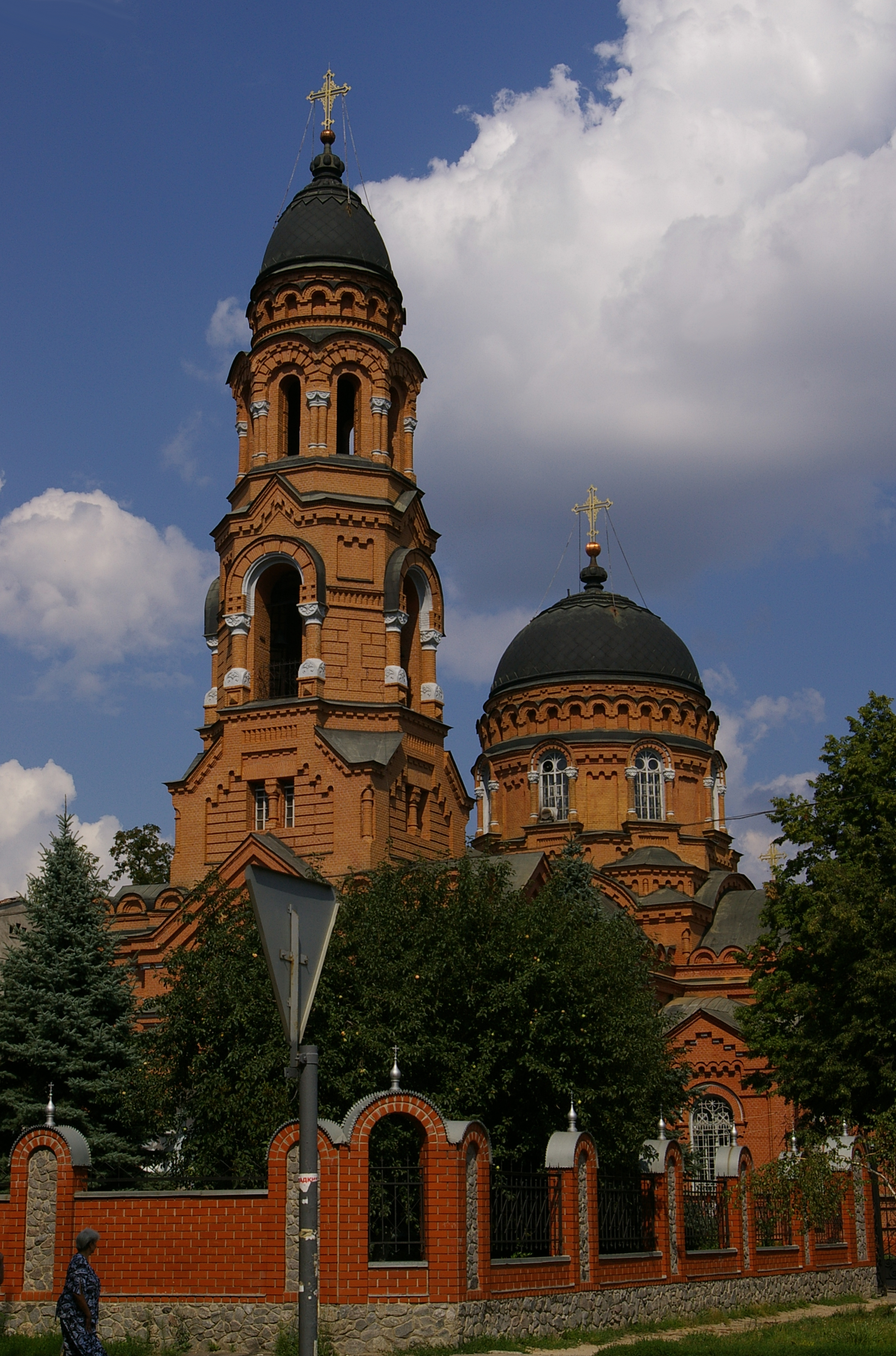 Свято-Озерянская церковь в Харькове, вид с угла Полтавской дороги и ул. Скорохода